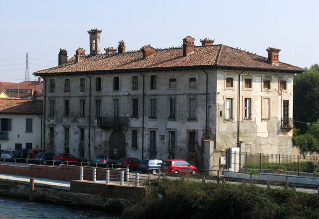 Abbiategrasso 09/2006